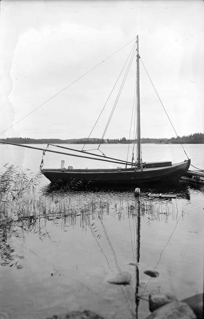 Storbåt eller förbåt från Näsby, Houtskär, Finland. 1932. SLS, Folkkultursarkivet Signum: sls410a_69